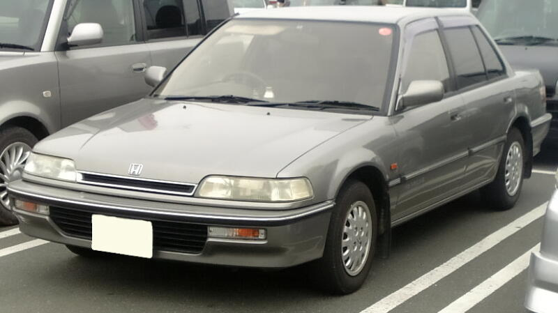 ホンダ・シビック（4代目・日本仕様セダン）